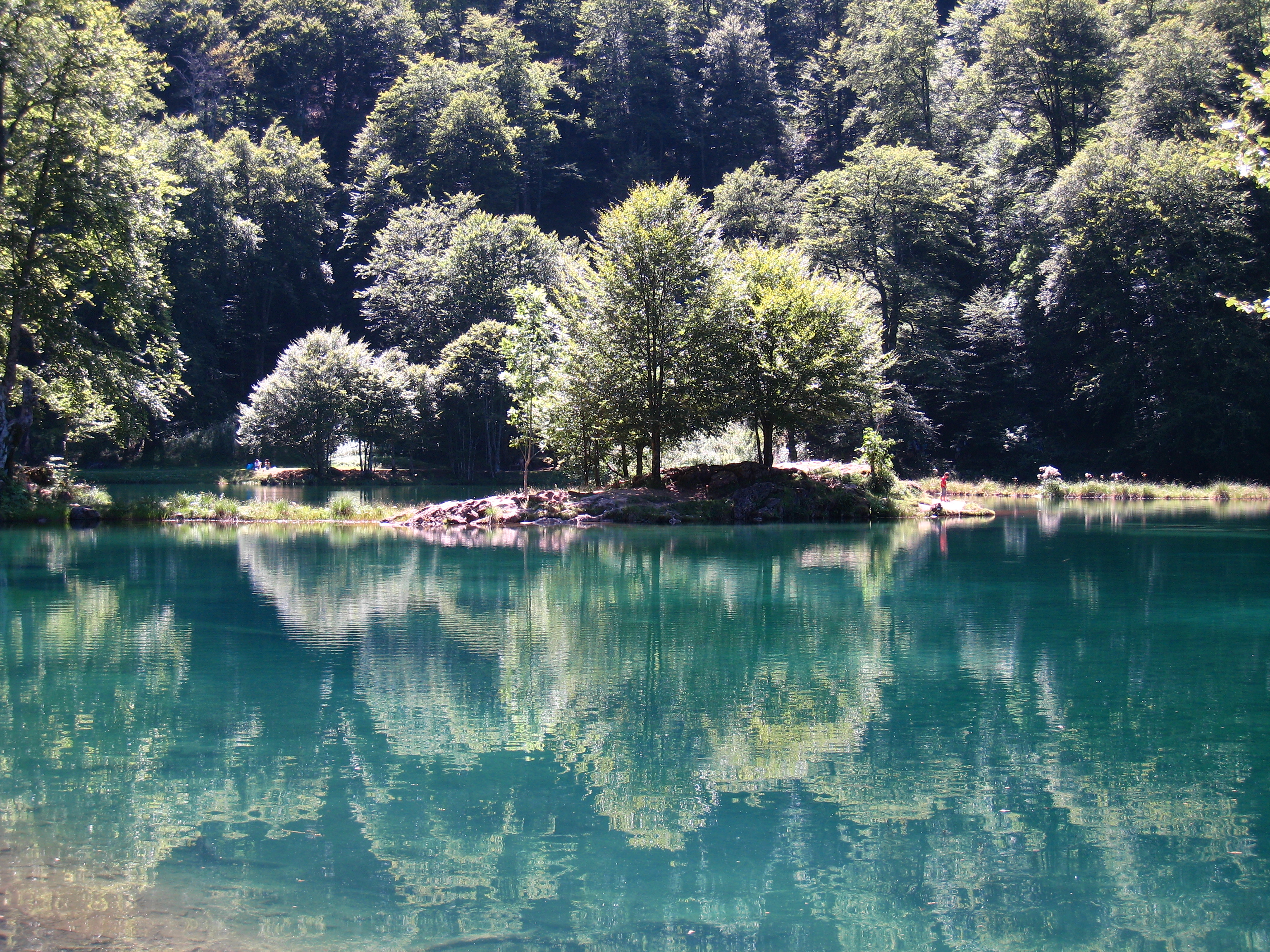 Étang de Bethmale 20070731